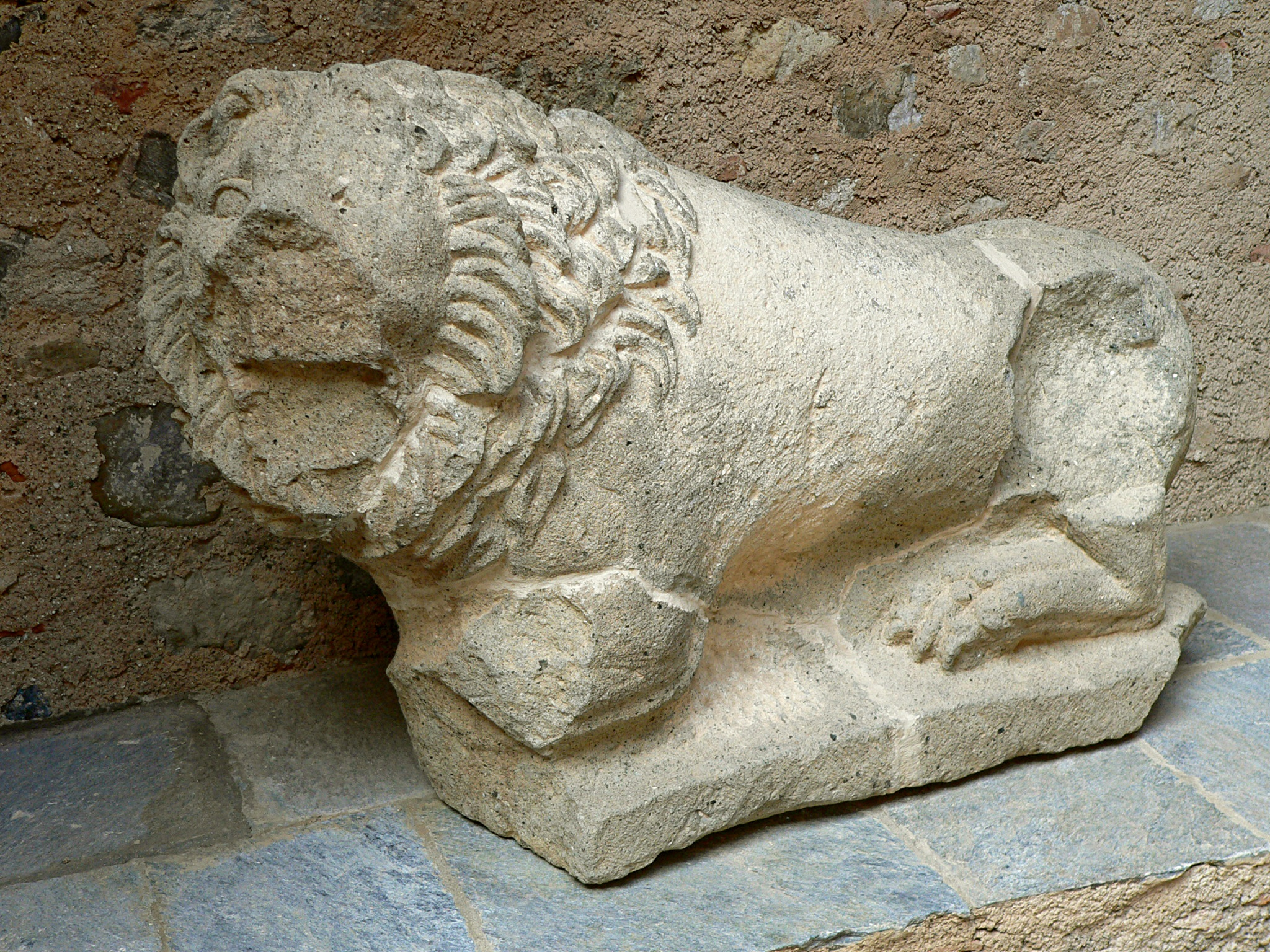 Lion étrusque, 4ème siècle avant J.-C.